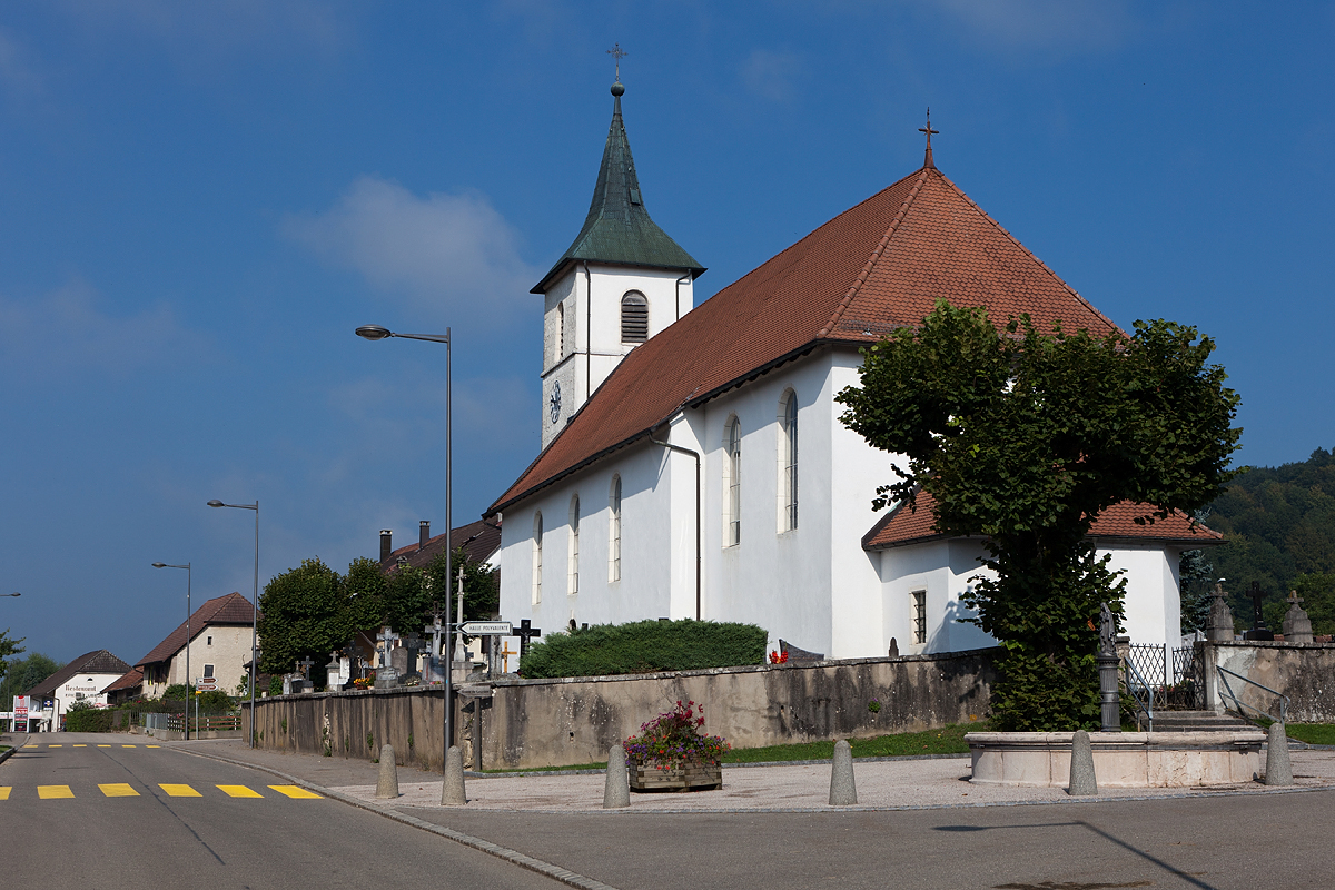 L'église paroissiale Saint-Germain à Damvant avec une fontaine circulaire (Haute-Ajoie, JU)